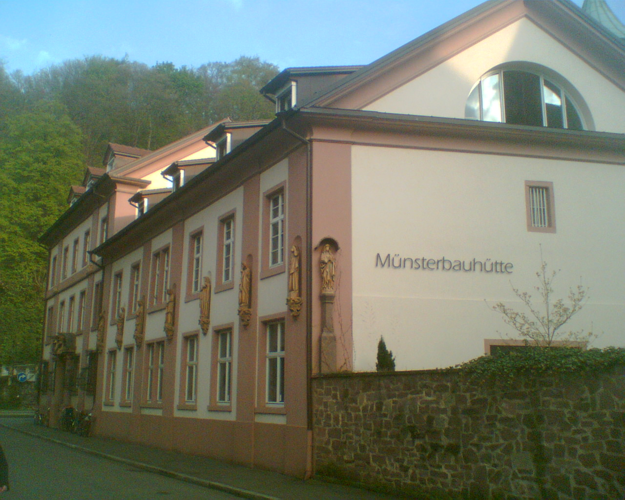 Münsterbauhütte in Freiburg im Breisgau, im Hintergrund der Schlossberg